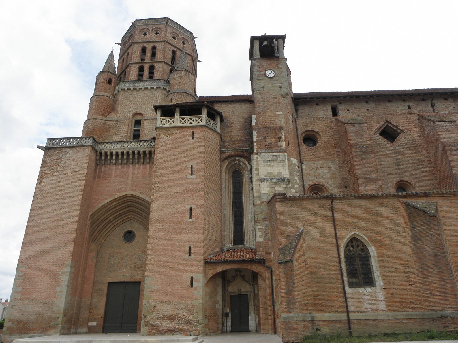 Vue méridionale de la cathédrale Saint-Alain de Lavaur (81). .